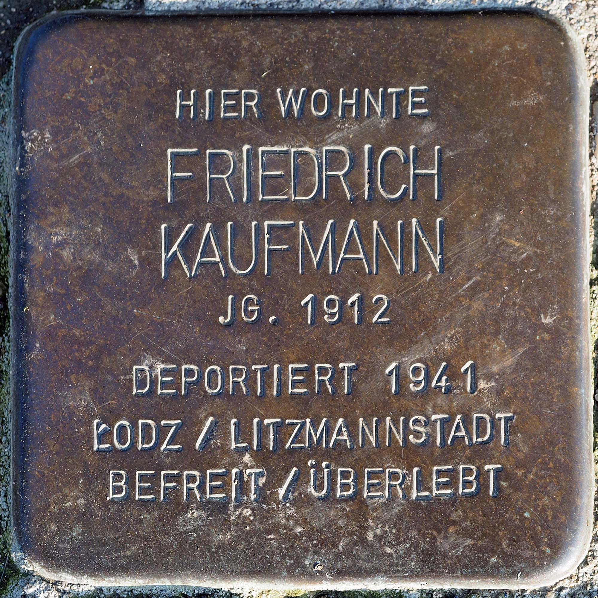 Stolpersteine Willich: Kaufmann, Friedrich